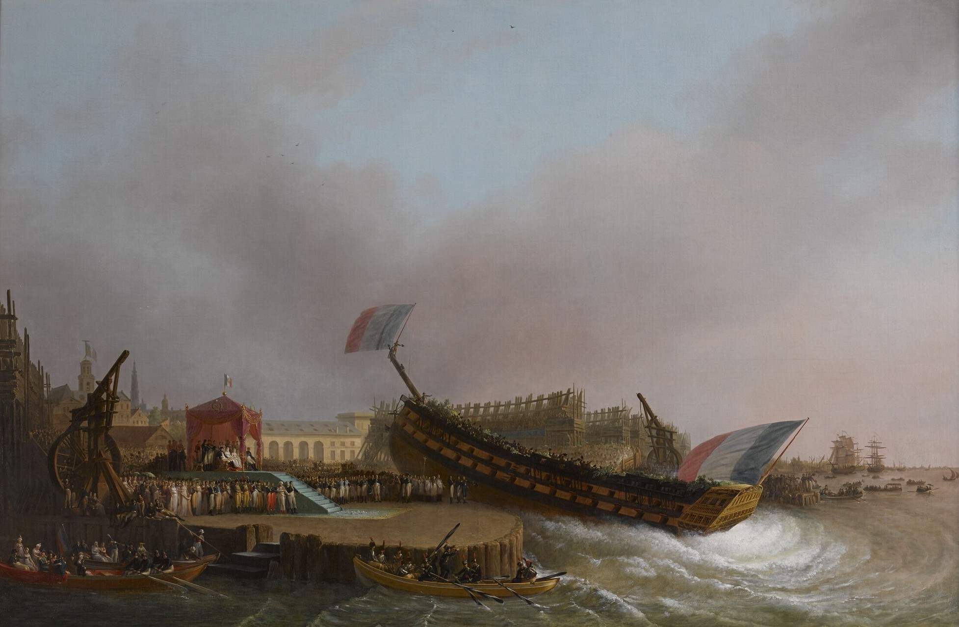 L'Empereur Napoléon Ier et l'Impératrice, entourés du roi et de la reine de Westphalie, assistant au lancement du vaisseau de 80 canons Le Friedland dans l'arsenal d'Anvers, le 2 mai 1810. Dimensions : 170,5 x 262,5 cm. Cadre: 185,5 x 278 x 9,5 cm. Matière et technique : huile sur toile.